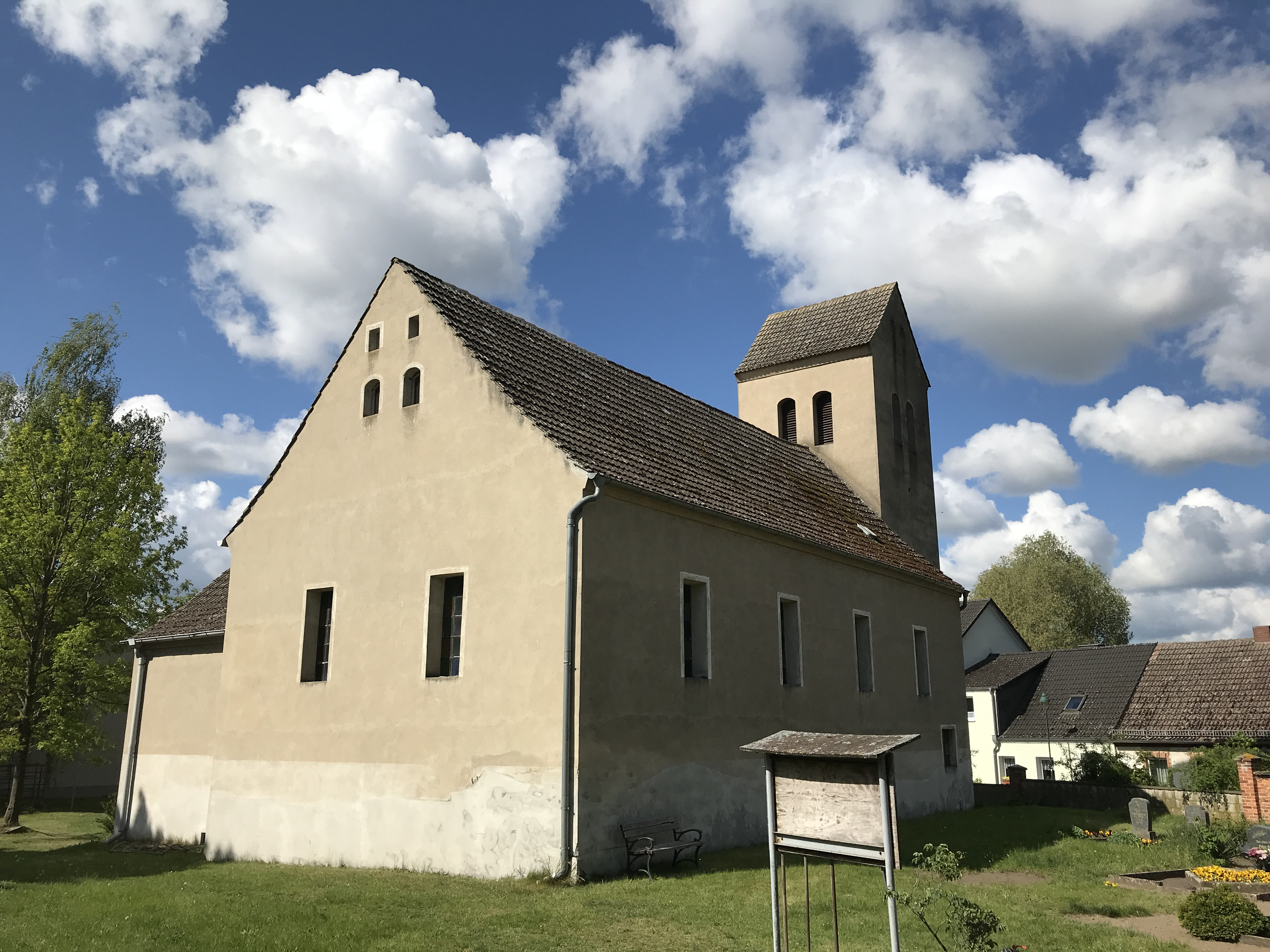 Die Dorfkirche Stangenhagen in Stangenhagen der Stadt Trebbin im Landkreis Teltow-Fläming ist eine Saalkirche aus dem Jahr 1727. Im Innern steht unter anderem ein Kanzelaltar, der vermutlich aus der Bauzeit stammt.